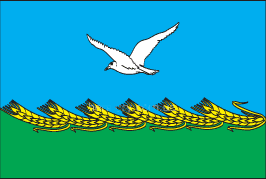 Прапор Жовтневого району Миколаївської області